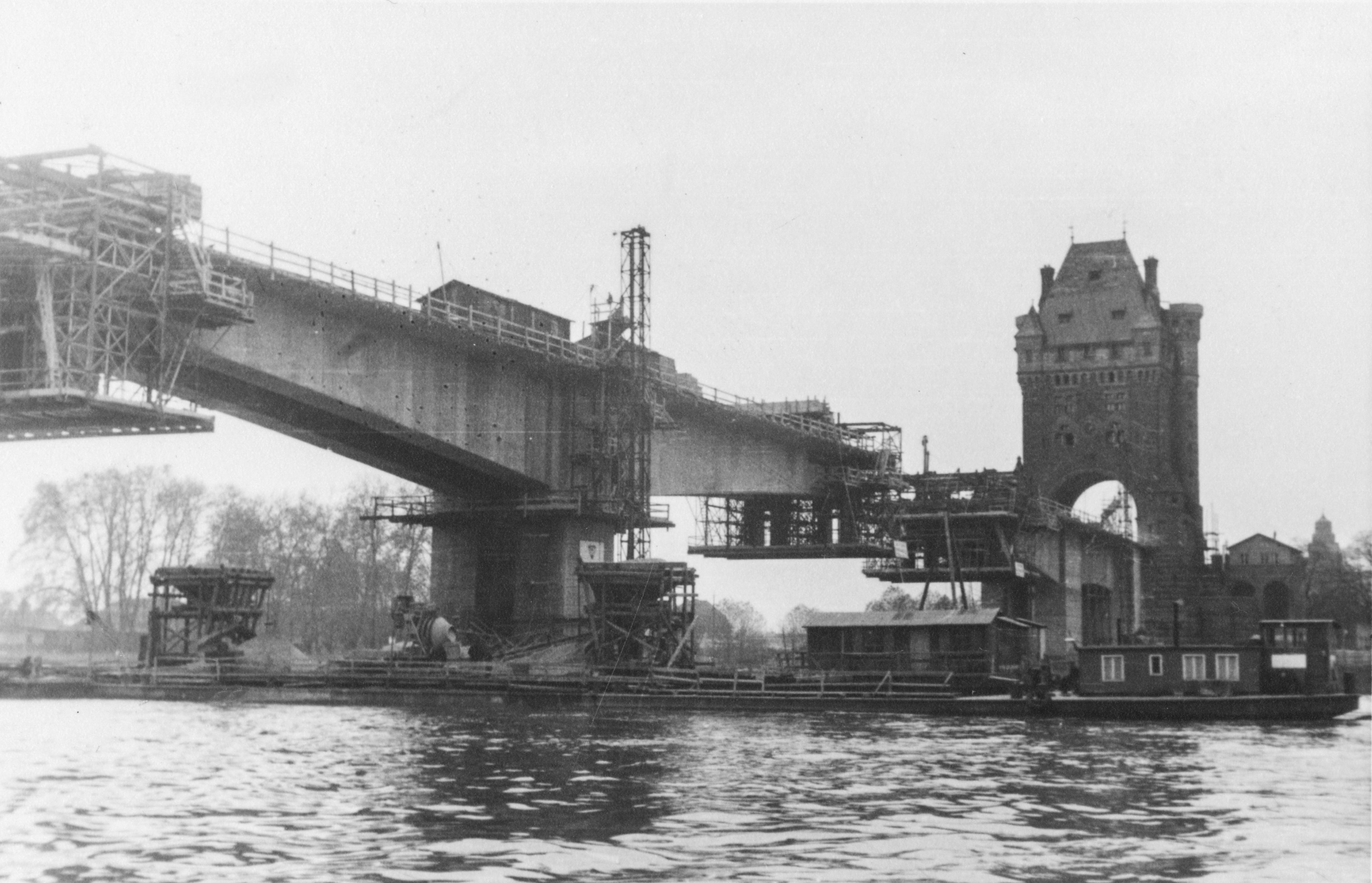 Bauarbeiten in der linken und mittleren Öffnung. (original Bildunterschrift der Quelle)